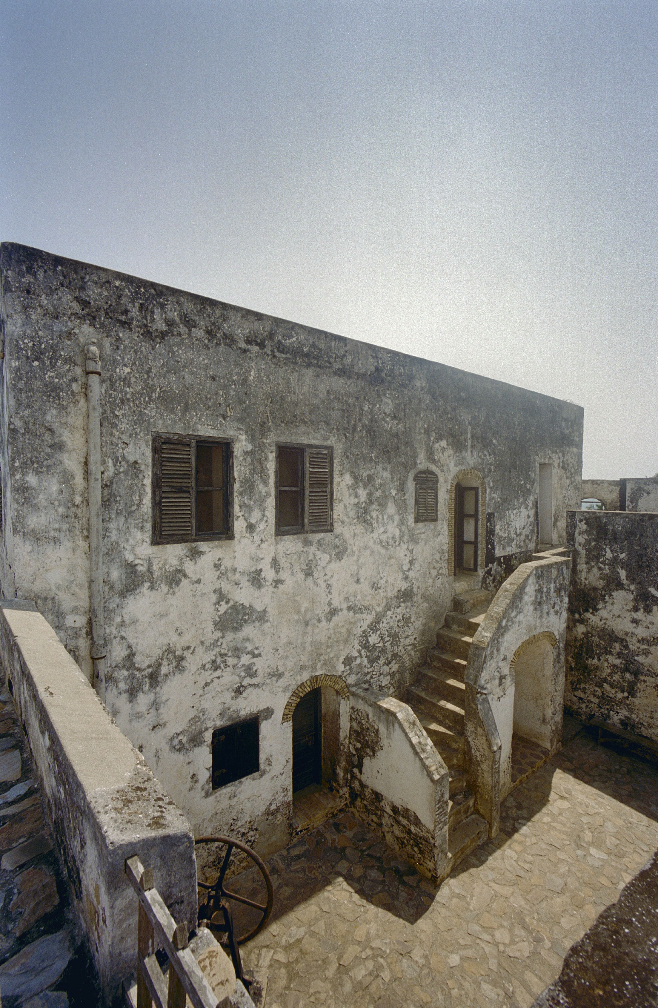 Fort Patience: Overzicht voorgevel met bordes binnen de buitenmuur (opmerking: Ghana reis Loek Tangel)